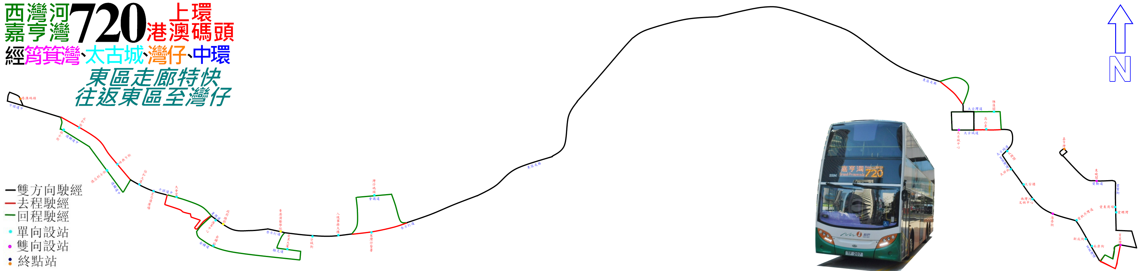 中文（香港）: 新巴720線的走線圖